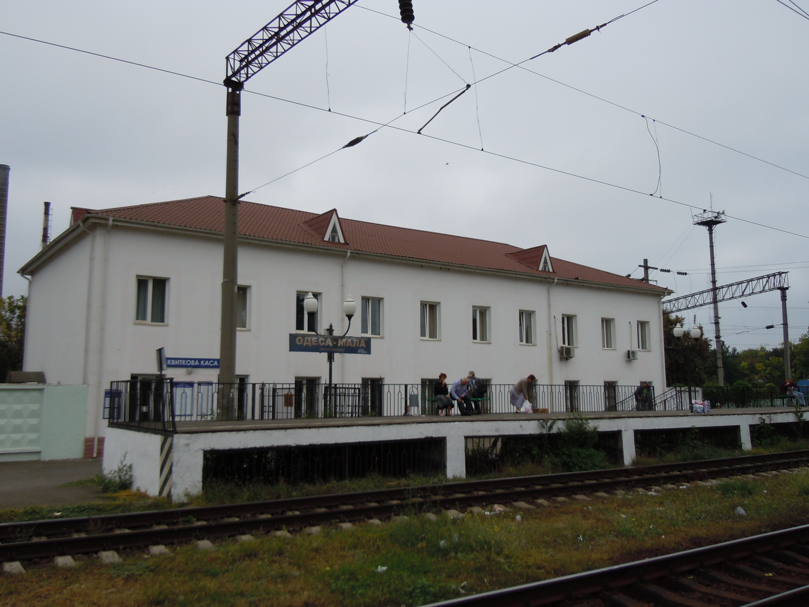 Залізнична станція Одеса-Мала. Платформа